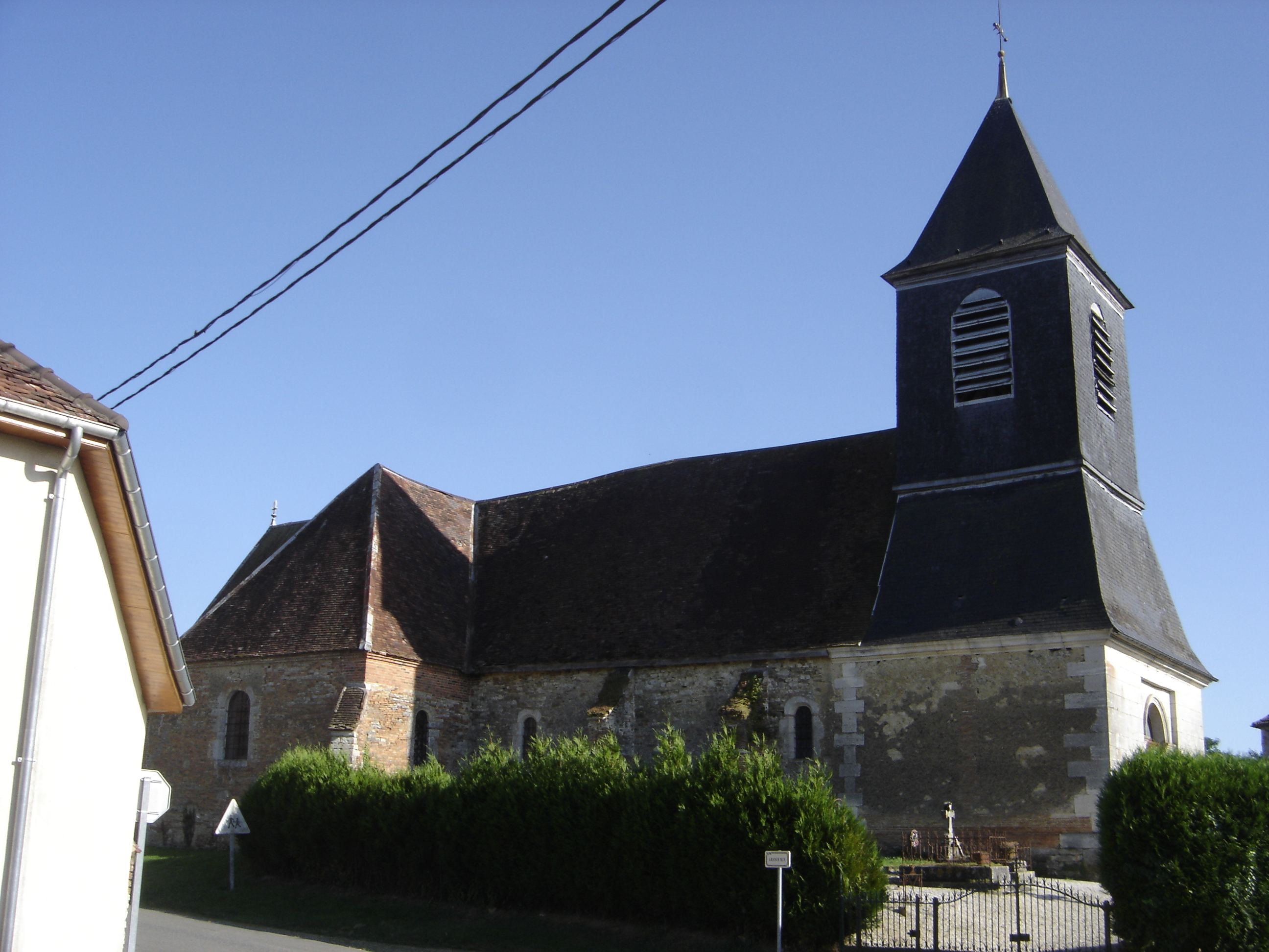 eglise Saint-Nicolas de La Villeneuve-au-Chêne - Aube - France